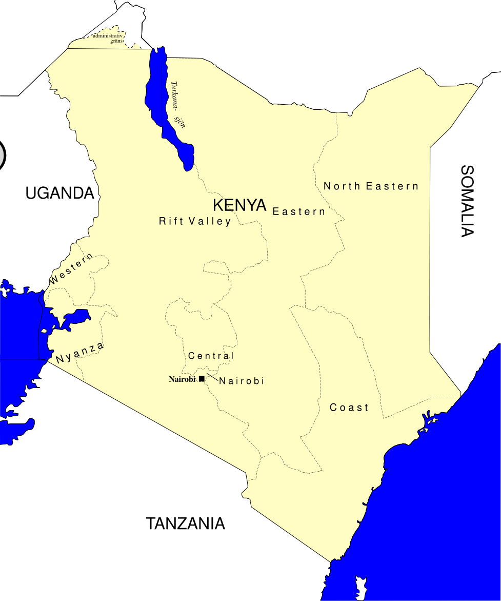 Turkanasjöns läge i norra Kenya